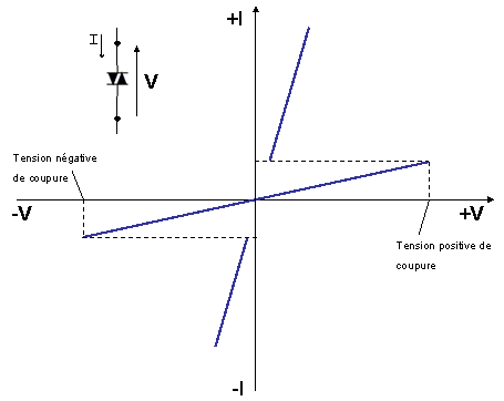 Caracteristique idéale d'un composant DIAC Auteur : Tchap